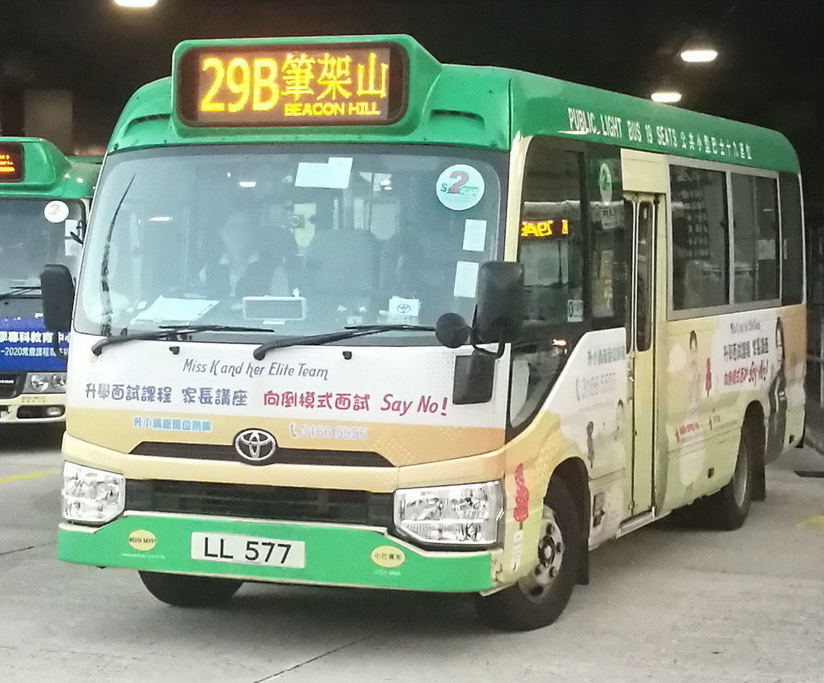 中文（中国大陆）: 小巴LL577的照片